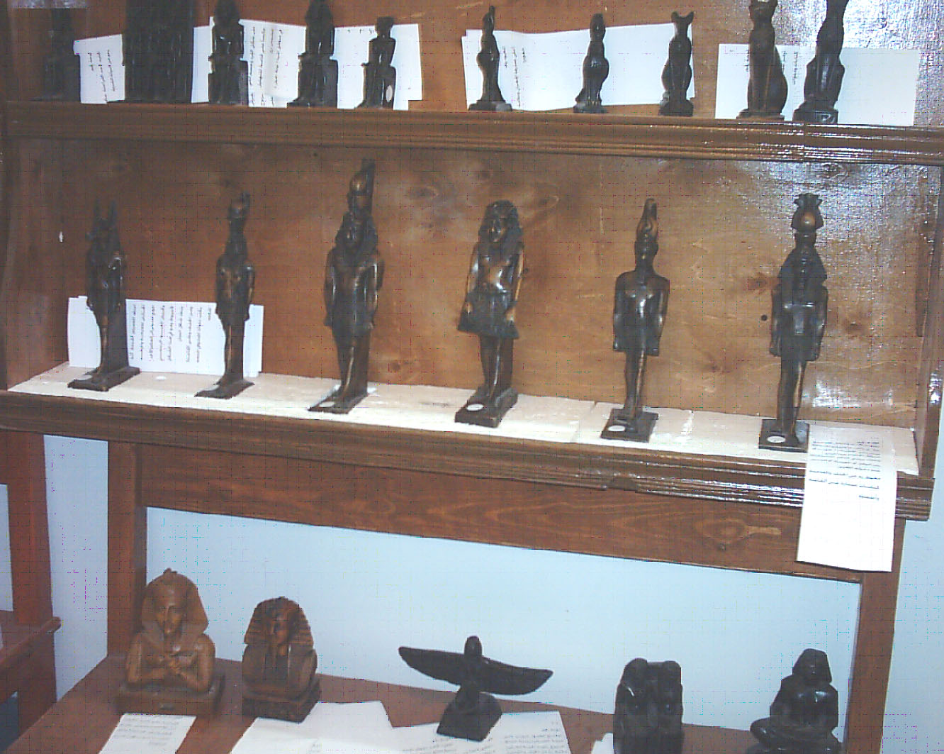 نماذج لبعض ملوك الفراعنة بالمتحف (منتج الصورة Eng_momo86)